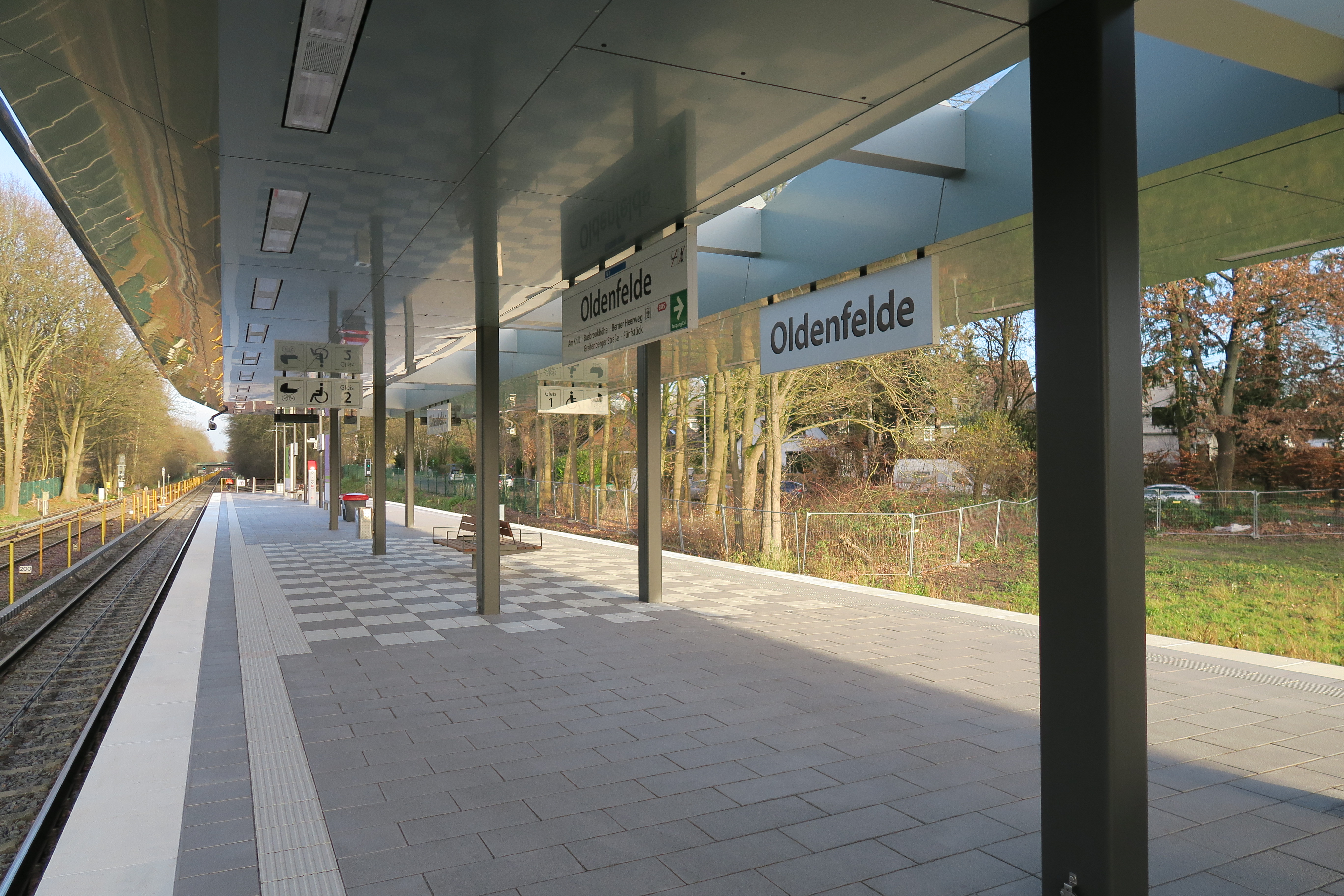 Bahnsteig des U-Bahnhofs Oldenfelde in Hamburg